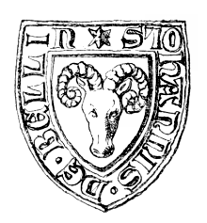 Darstellung Wappensiegel der von Bellin. Das Siegel in Original hängt an einem (nach dem Original auf der Lübeker Trese im Urkunden=Buche der Stadt Lübek II, 2, S. 616 gedruckten) vom 1. Oktober 1337 dateirten Schuldbriefe des Knappen Nicolaus v. Bülow auf Zibühl, dessen Bürge Johannes Bellyn war; und ein zweites Exemplar dieses Siegels hat sich erhalten an einer im Klosterarchiv zu Dobbertin aufbewahrten Urkunde, welche die Fürsten Nicolaus und Bernhard von Werle am 25. Aug. 1342 zu Güstrow ausgestellt haben.